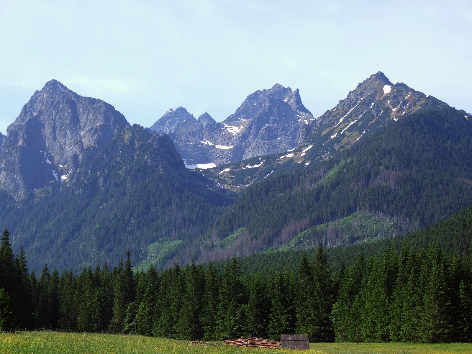 Żabia Dolina Białczańska, widok z polany Biała Woda. Po jej lewej stronie Młynarz, po prawej Żabia Czuba, ponad nią Rysy, Niżnie Rysy, Wysoka, Ciężki Szczyt